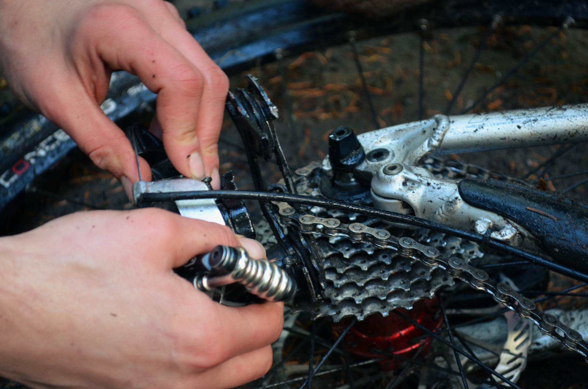 Forcellino del cambio rotto, su una mountain bike